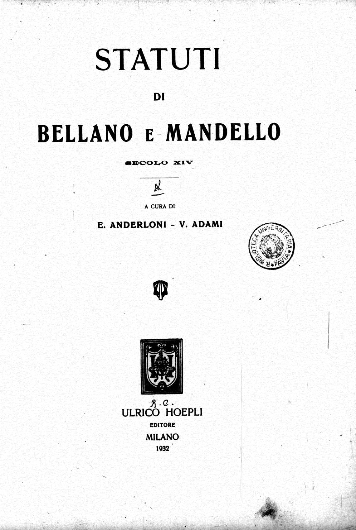 Frontespizio